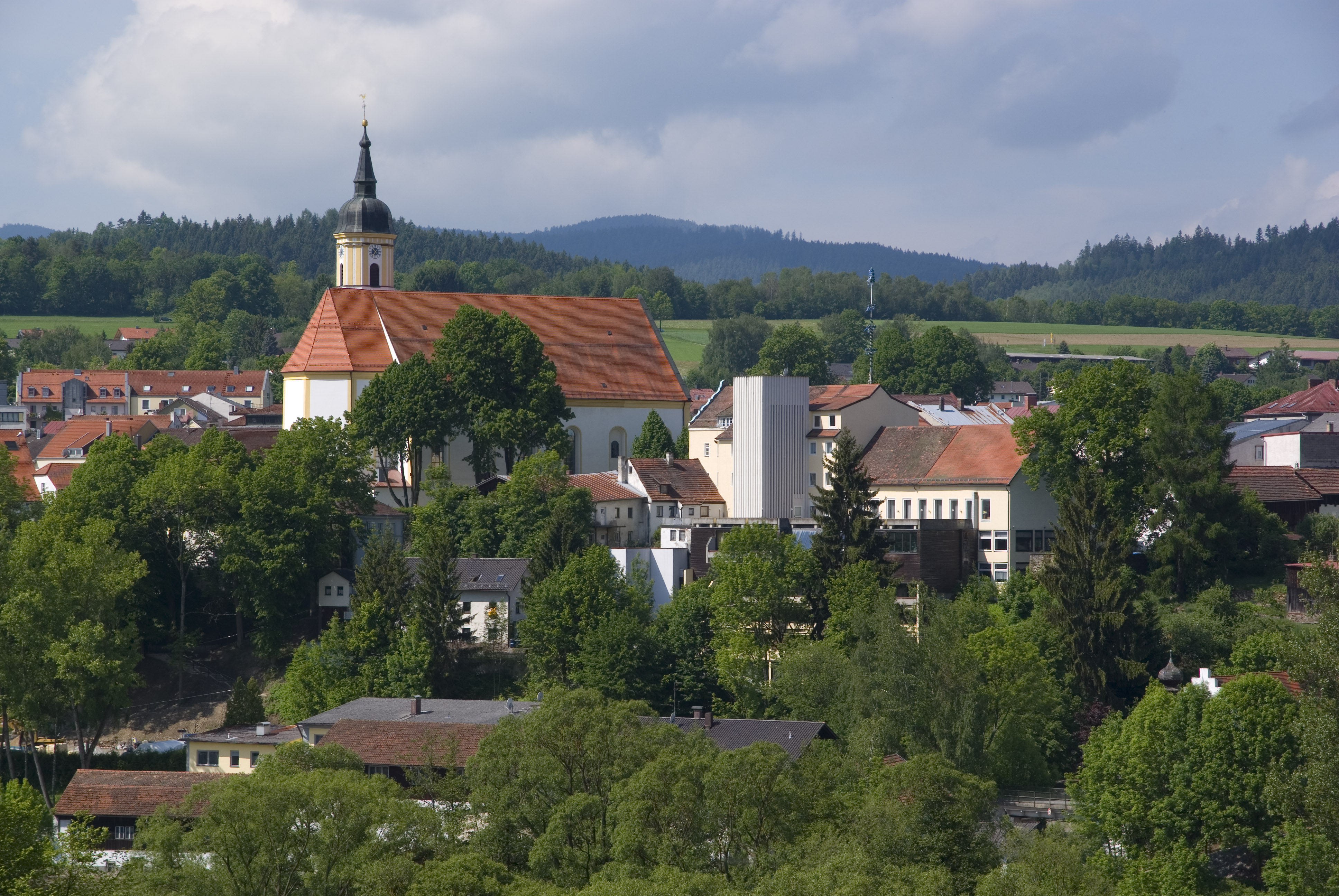 Zentrum von Viechtach